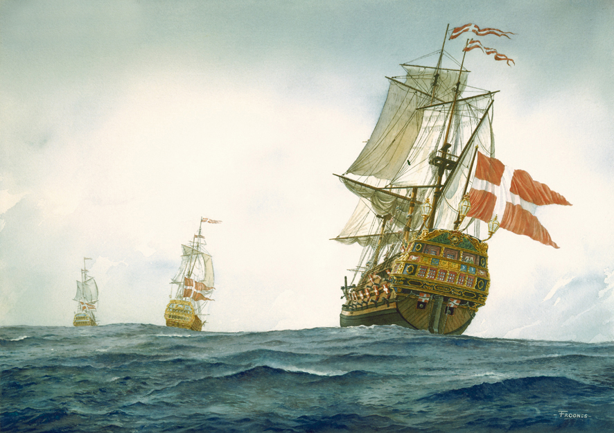 Tordenskiolds flaggskip Laaland, 1717